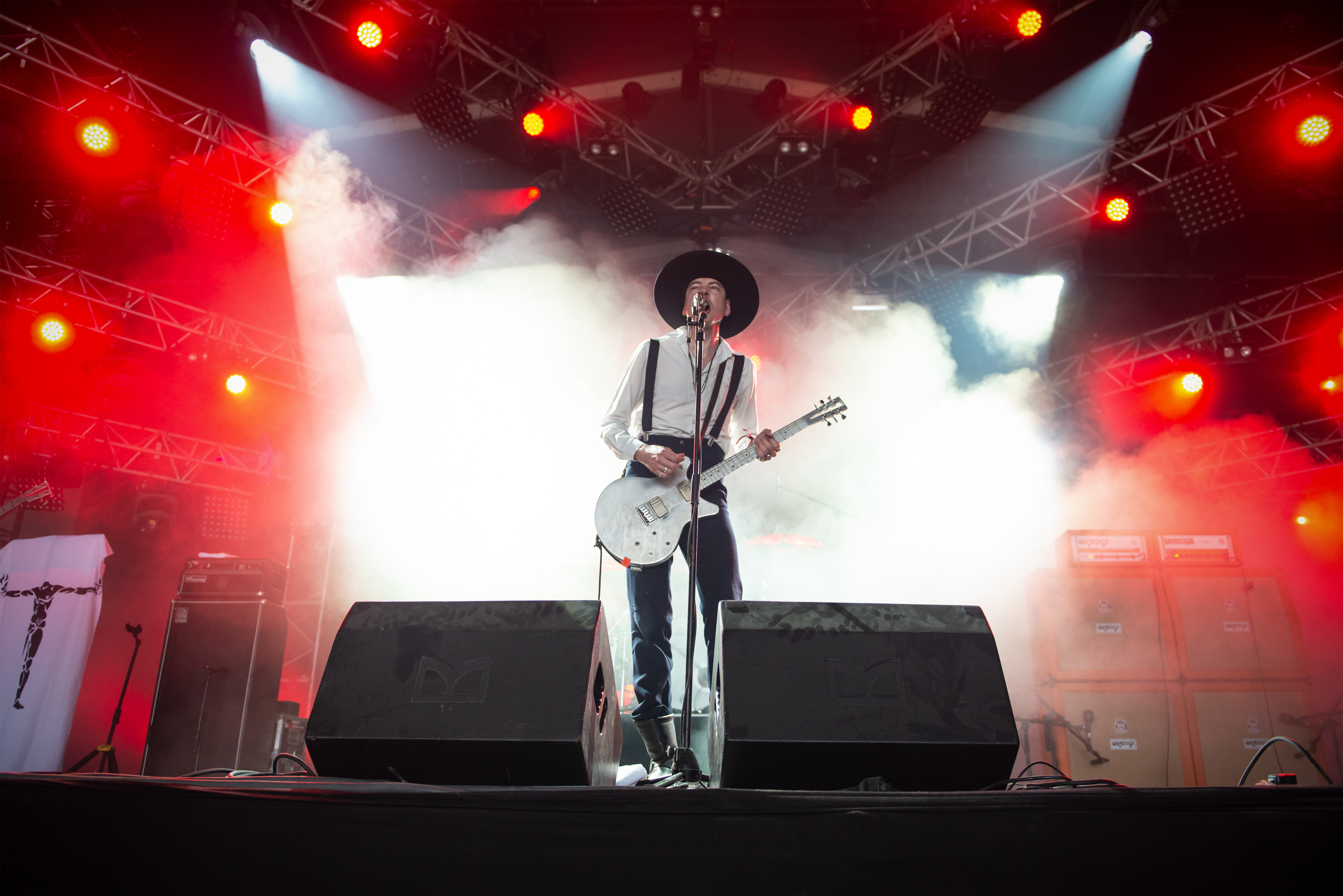 Concert du groupe Arabrot au Hellfest 2019.